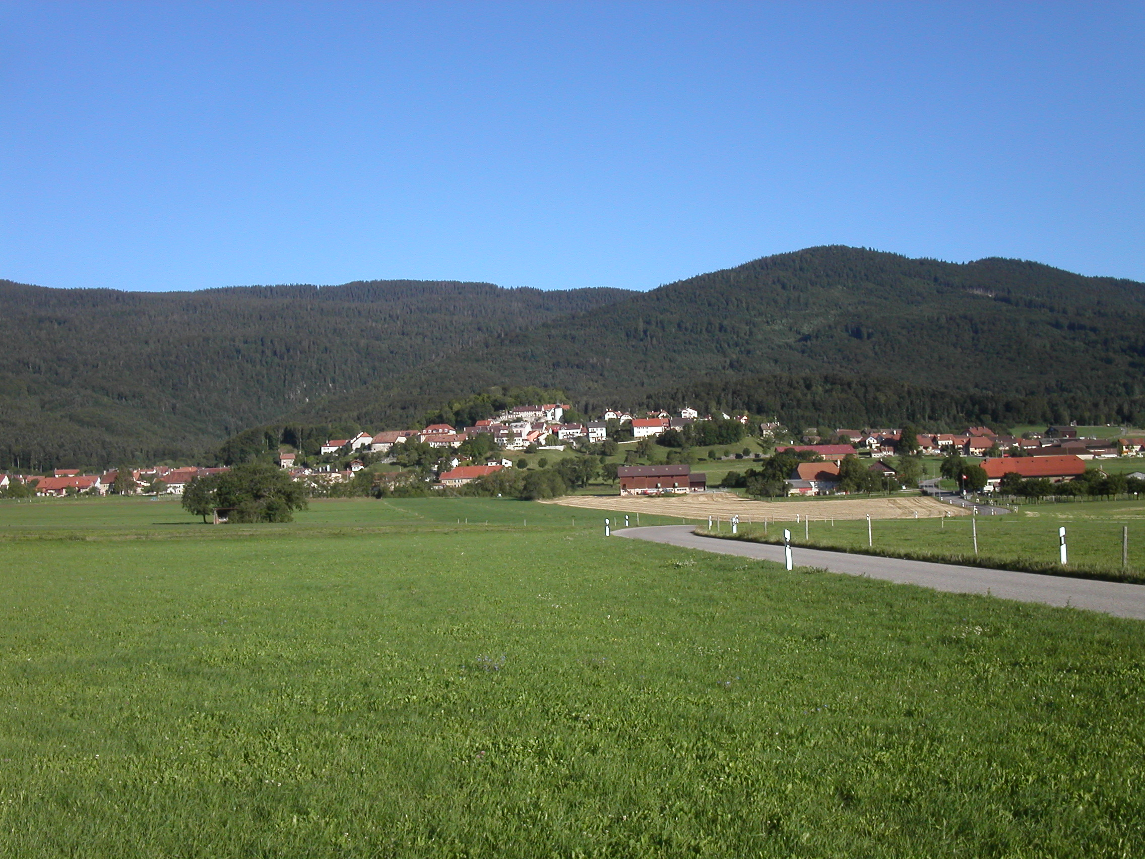 Montricher, Vaud, Suisse